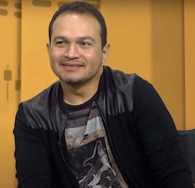 Davi Sacer, em entrevista no programa Galeria Clip, da Rede Boas Novas.